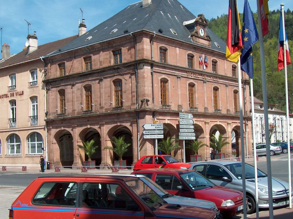 Mairie de Raon l'Etape, Vosges, France